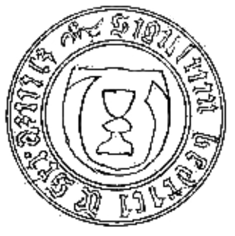 Pečeť Bedřicha ze Strážnice